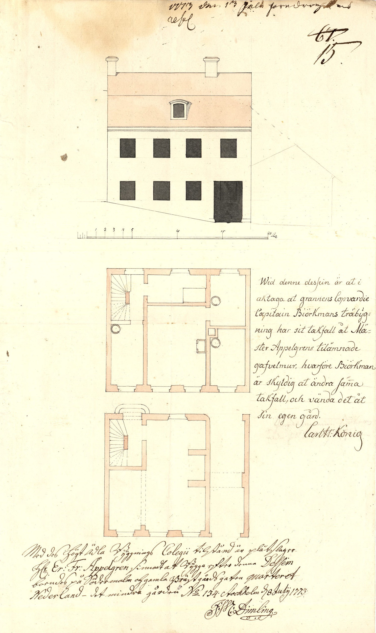 Nybyggnad för gathuset (västra del) i Nederland mindre 9